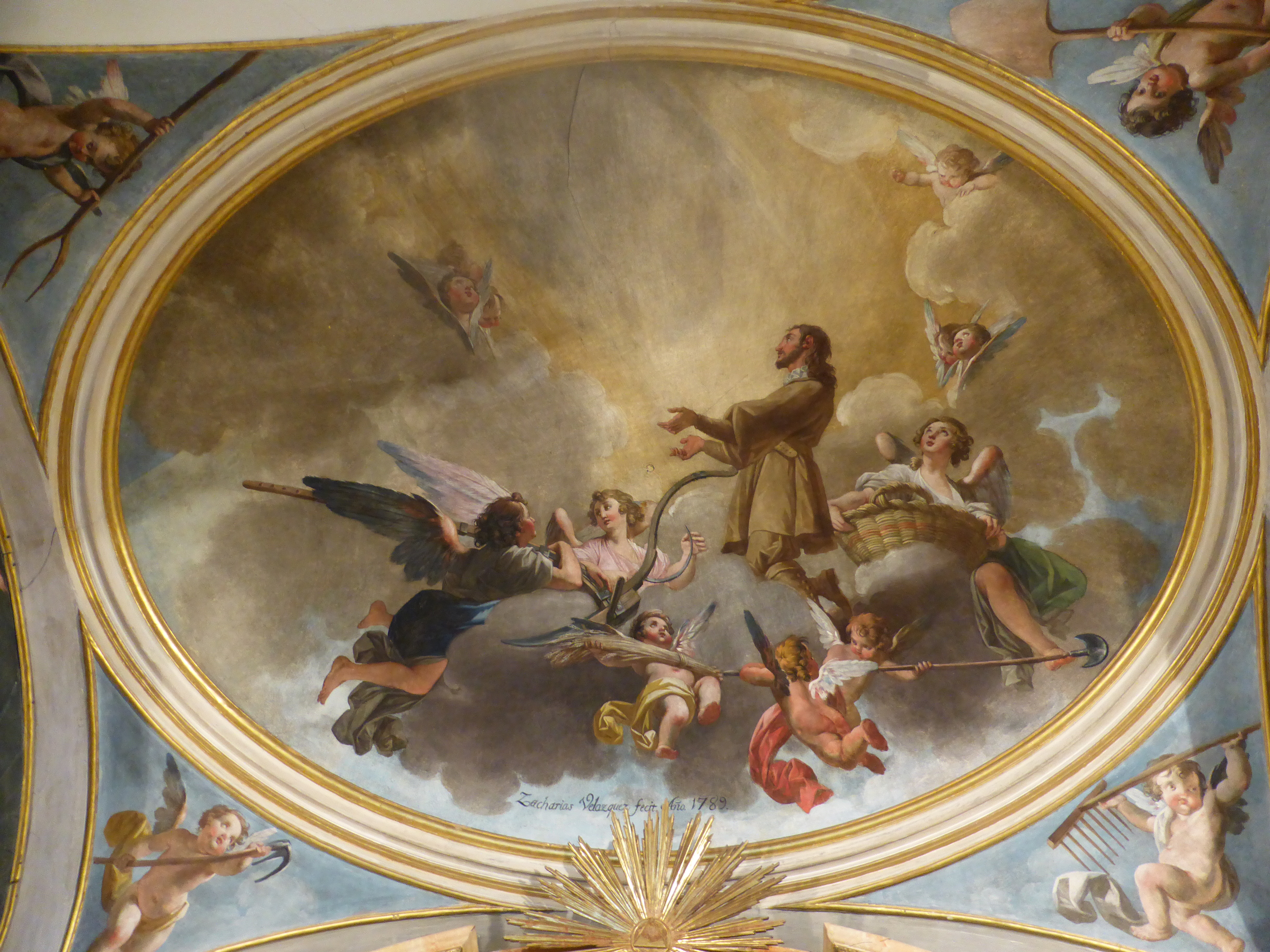 Museo de San Isidro (o Museo de los Orígenes de Madrid). Pintura mural de la capilla, representando la apoteosis de San Isidro, firmada: "Zacharias Velazquez fecit. Año 1789".